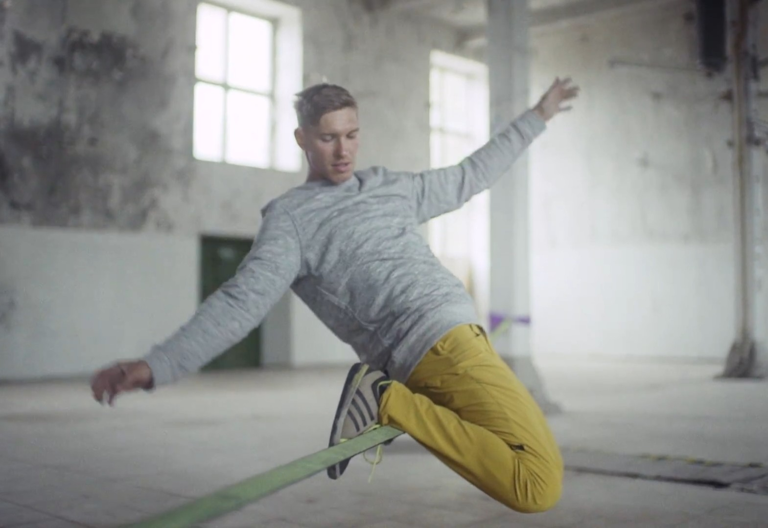 Der mehrfache Slackline-Weltrekordhalter Lukas Irmler im Porträt im Zuge des Drehs zum HUAWEI Genius Playground. Jetzt den Hauptfilm ansehen: Mehr erfahren